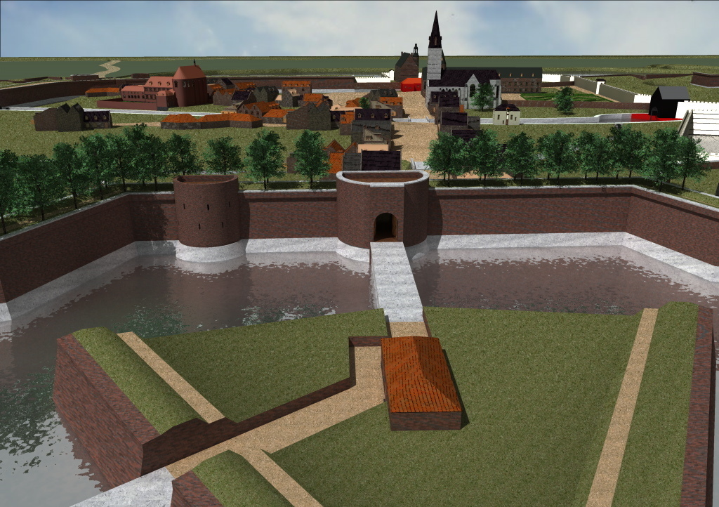 Pont dormant de Saint-Ghislain